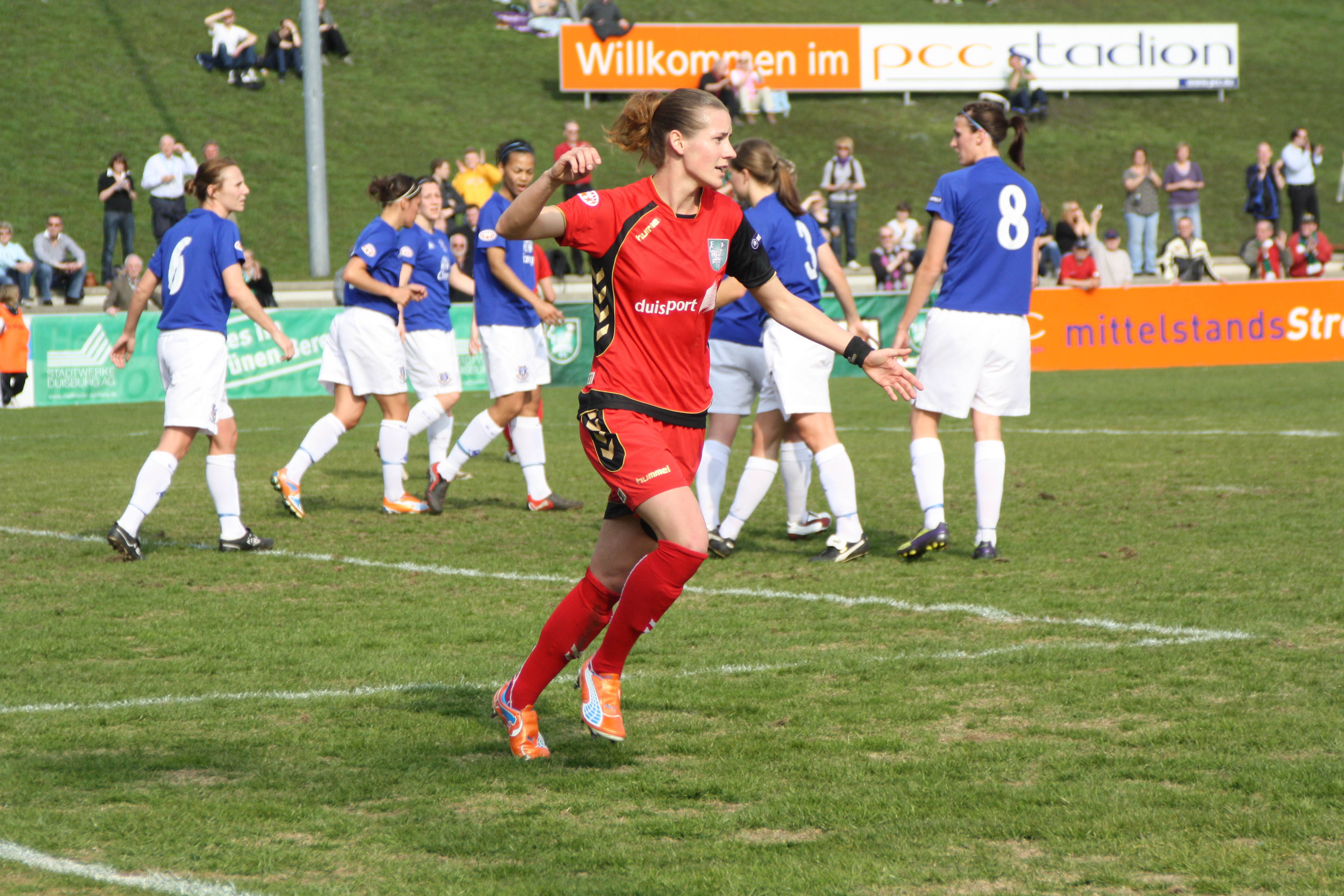 Simone Laudehr, FCR 2001 Duisburg